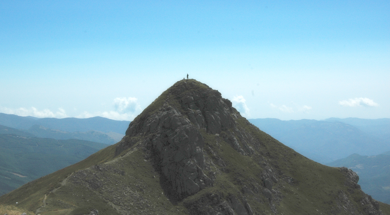 Monte Libro Aperto (MO) da cima vicina